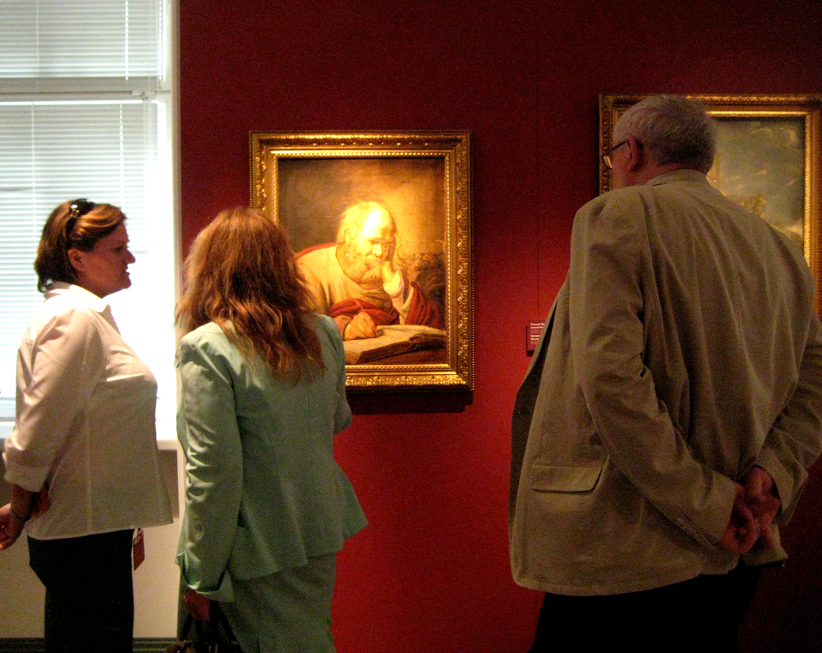 Выставка "Возвращение Святого Луки", Москва, Пушкинский музей 2012